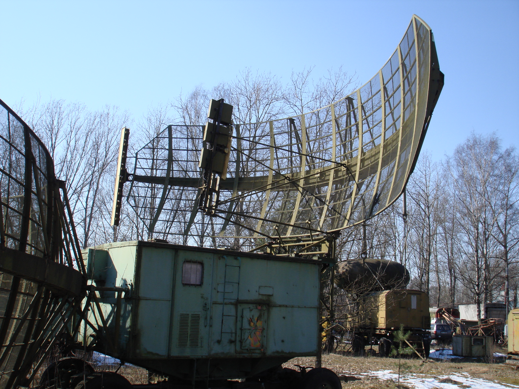 П-35м "Меч-35" разработанная в 69-70, Меч - дальнейшая модификация Сатурна.